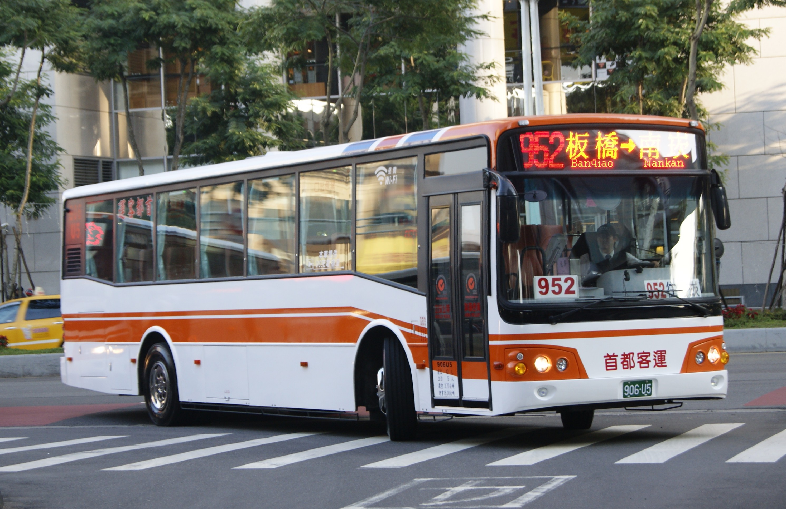 中文（台灣）: 首都客運首條行駛至桃園區域跨區公車952線上路 906-U5